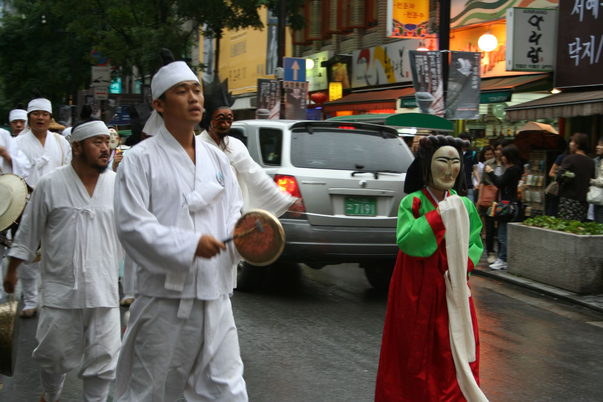 서울의 축제의 한 모습.